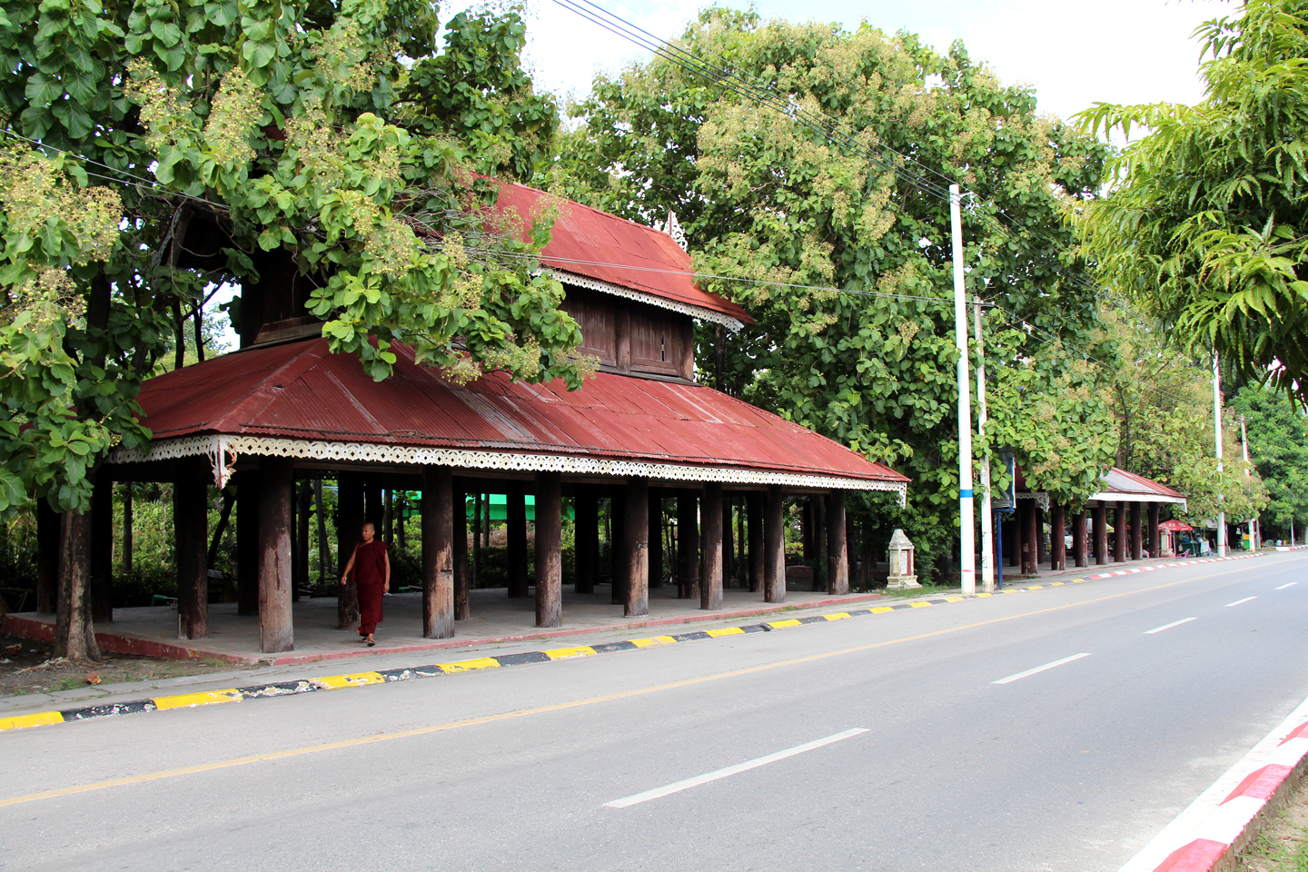 မြန်မာဘာသာ: မန္တလေးတောင်ခြေရှိ သုဓမ္မာဇရပ်များ